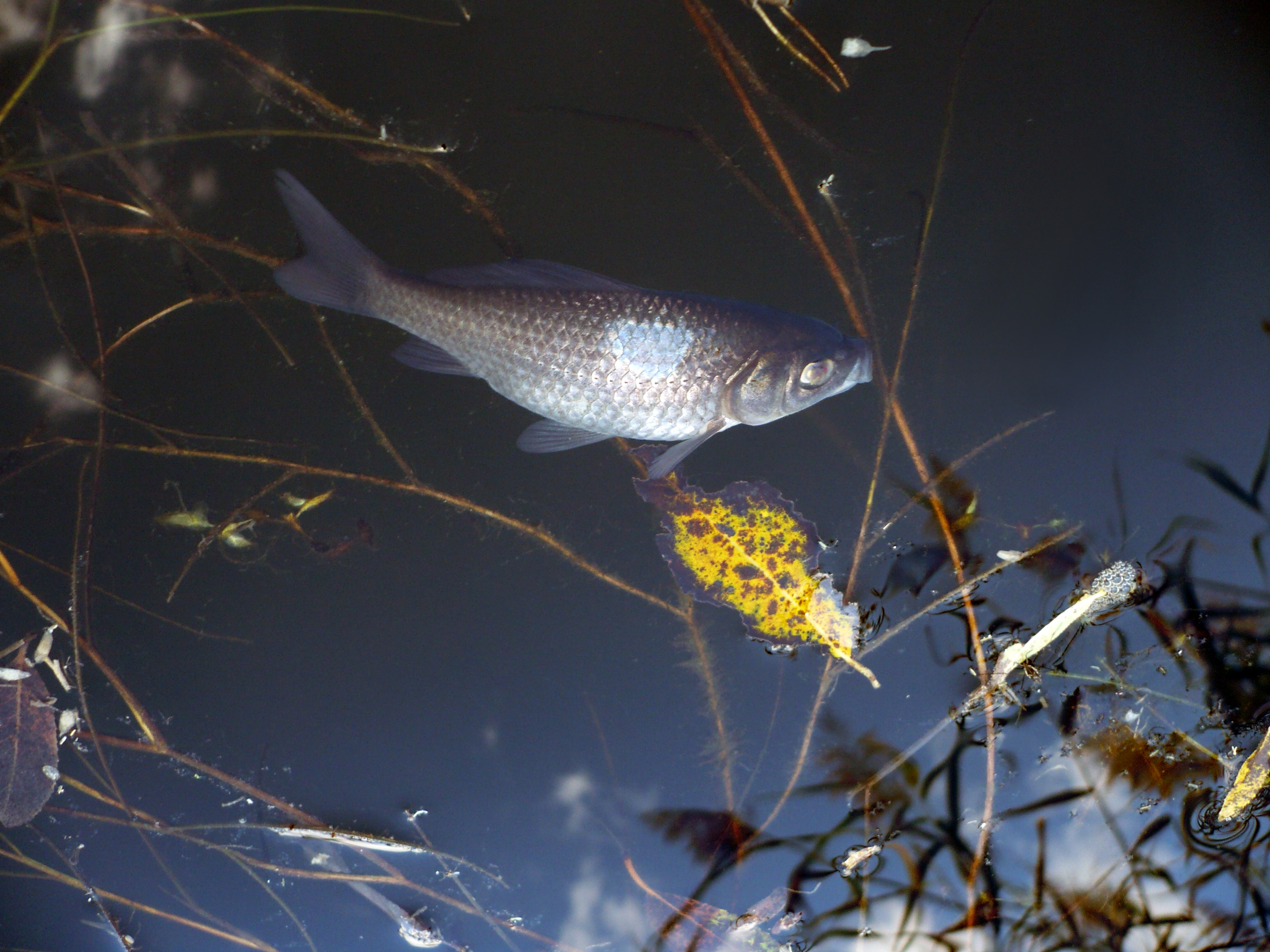 Золотой карась. Хутор Гремячий,Белгородская область